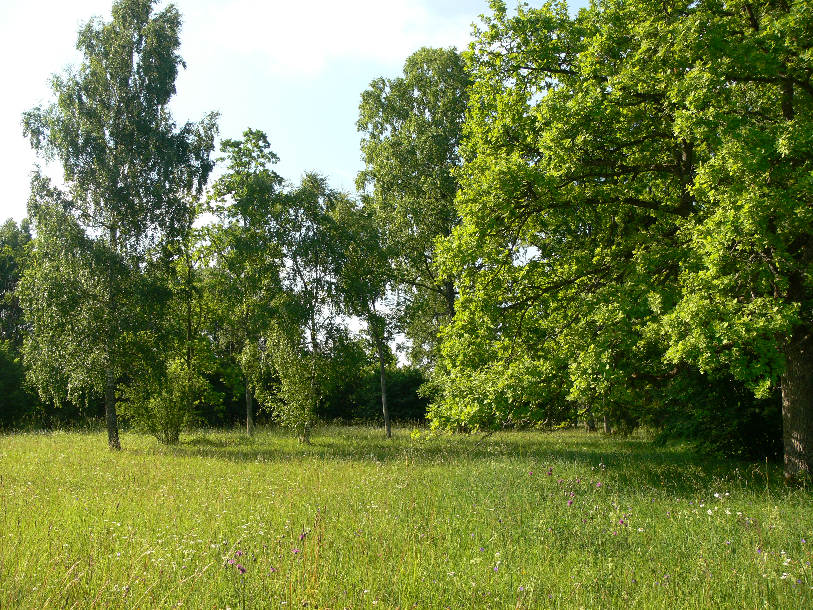 Kirikuküla, Matsalu Rahvuspark